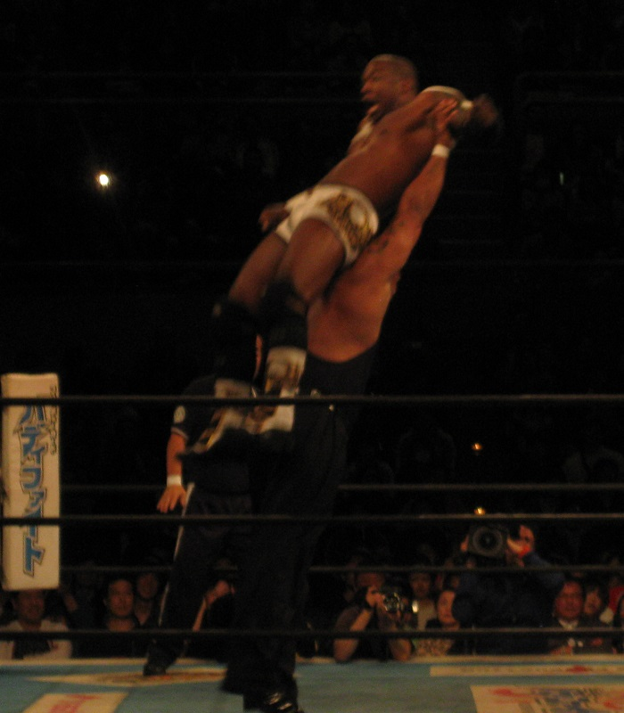 2014年3月23日 ベイコム総合体育館 「NEW JAPAN CUP Final」 シェルトン・X・ベンジャミンにバッドラックフォールを仕掛けるバッドラック・ファレ